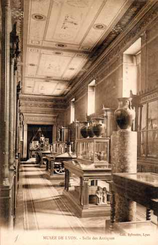 Vue de la galerie des antiques (aménagée en 1839) du musée des Beaux-Arts de Lyon vers 1906, carte postale d'époque.